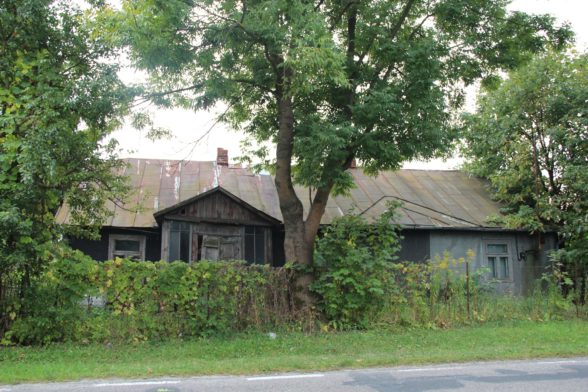 Uhrusk, drewniany dom